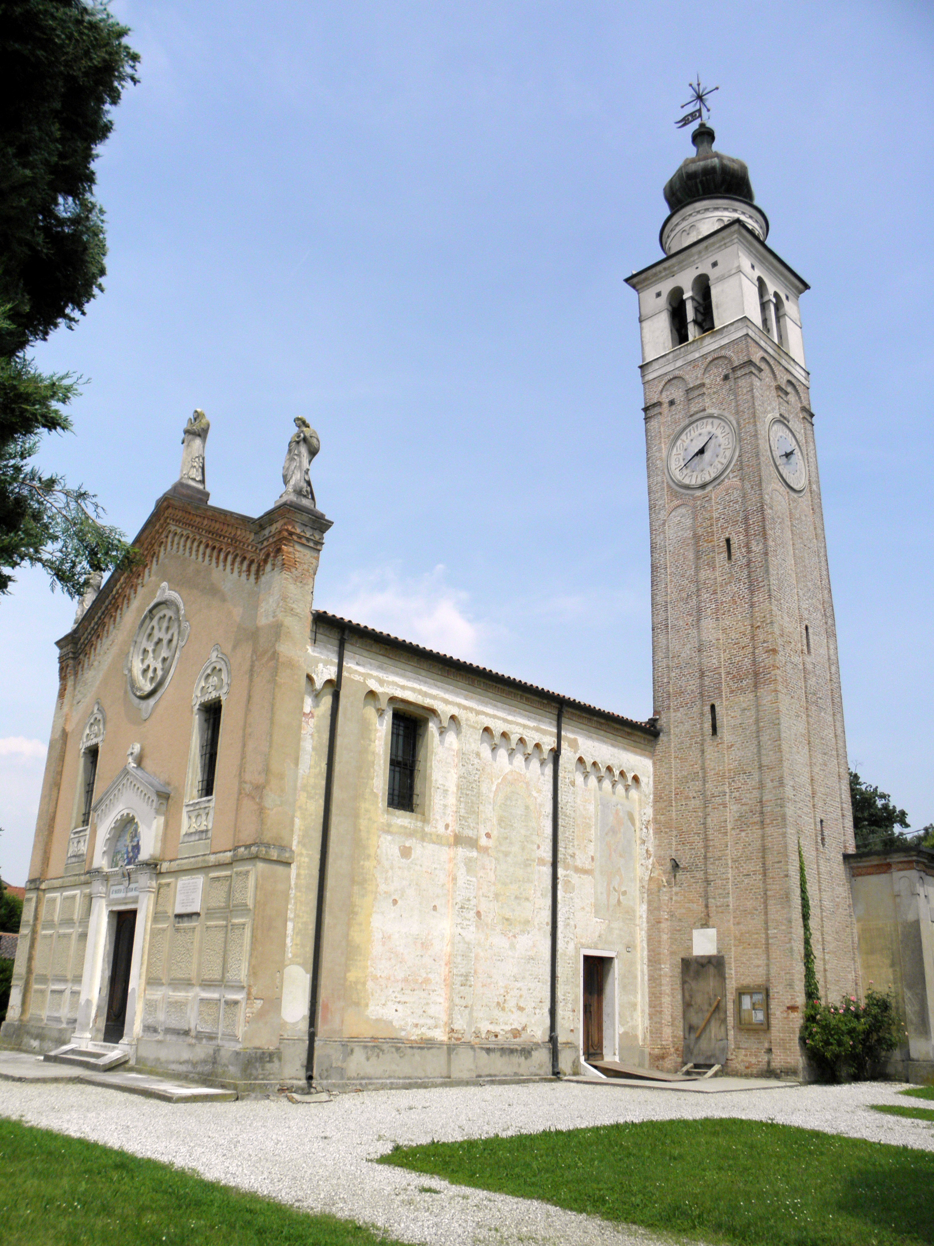 Campocroce, frazione di Mogliano Veneto: la chiesa parrocchiale di San Teonisto, sede della parrocchia dei Santi Teonisto e Compagni martiri.